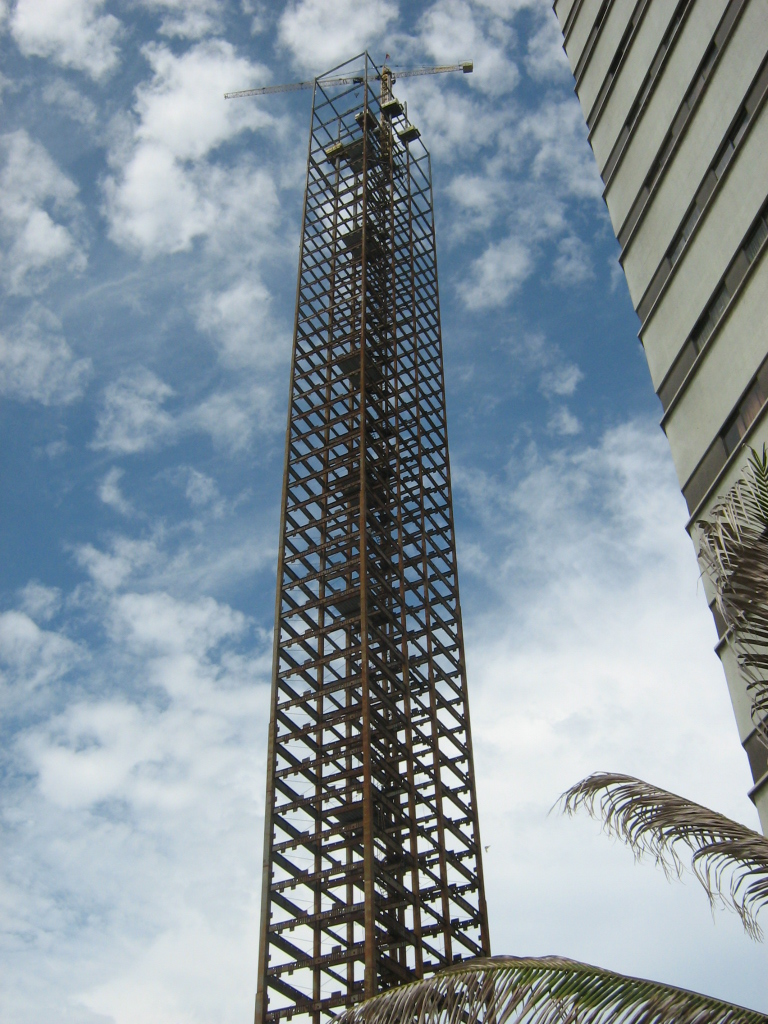 Torre de La Escollera